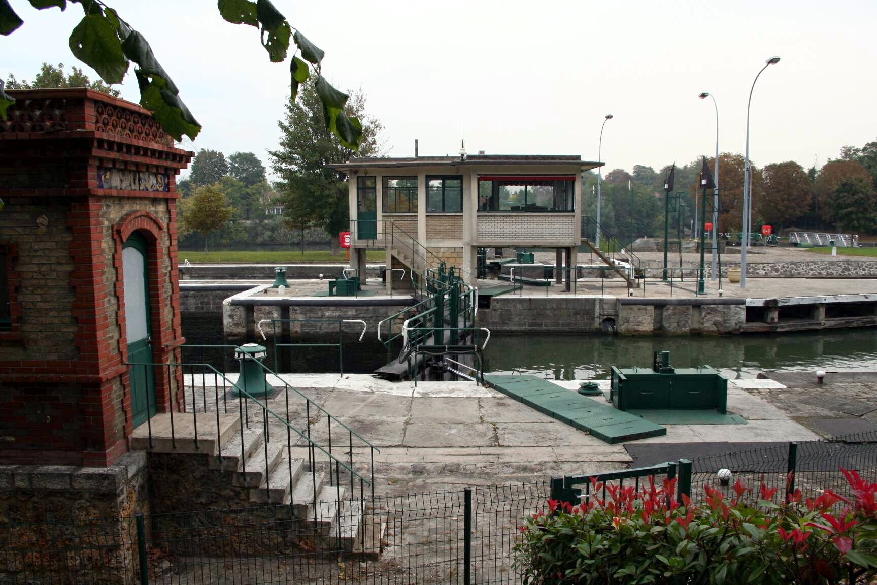 Écluses de Bougival - Yvelines (France)